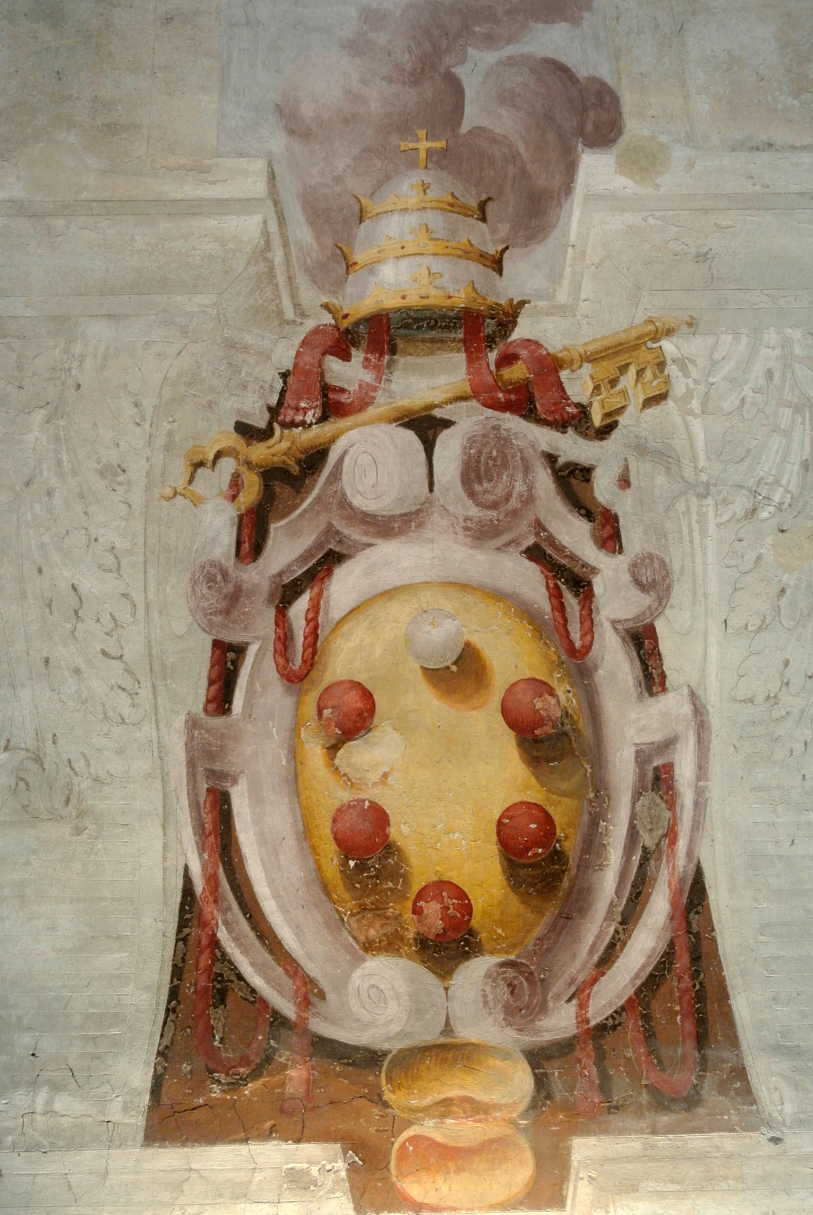 Embleem van paus Leo X de Medici